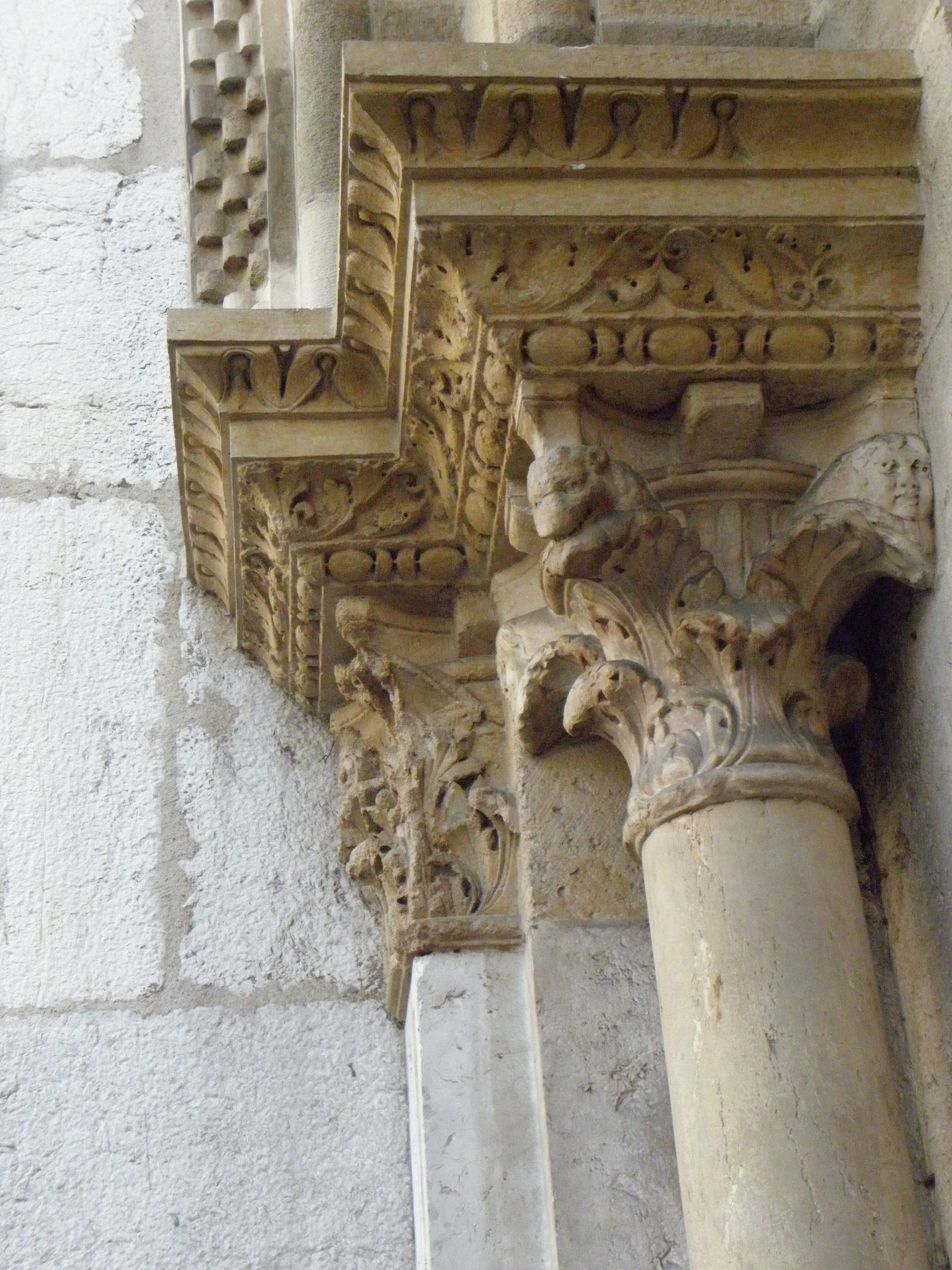 Chapiteaux de l'ébrasement gauche du portail occidental de l'église Saint-Pierre-des-Terreaux de Lyon (69). .